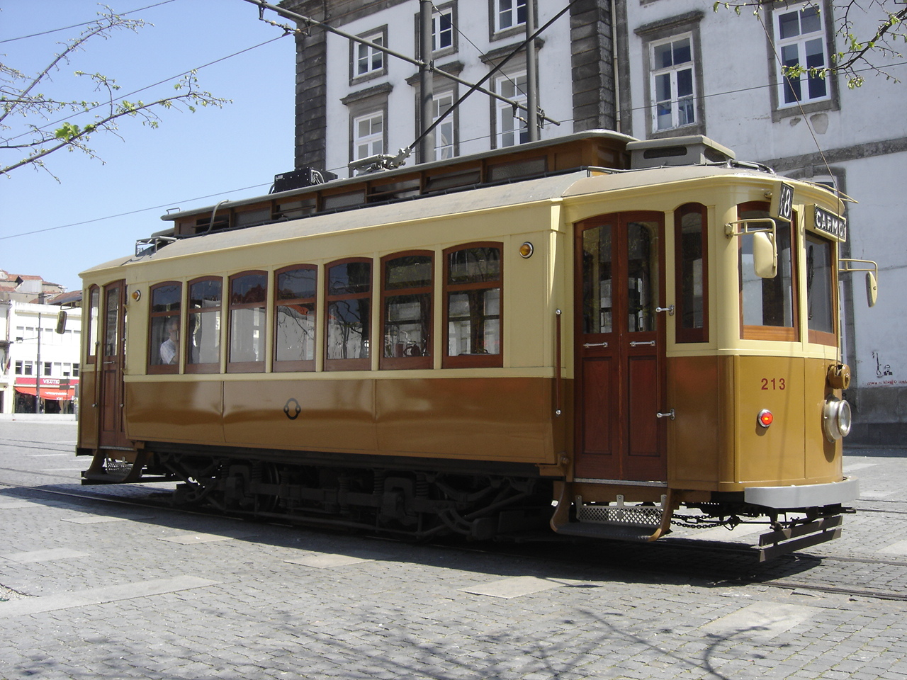 Electrico Porto